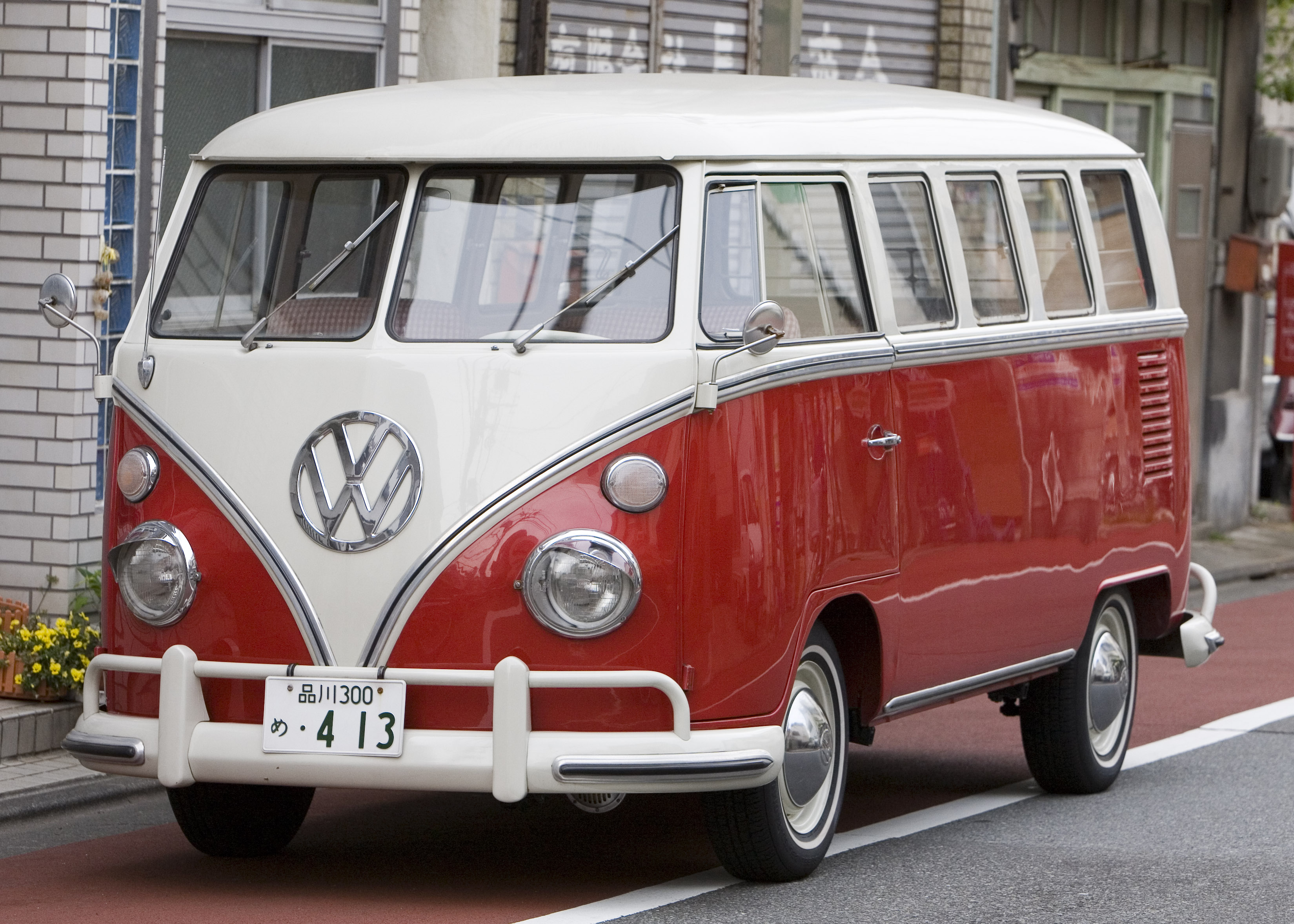 A Volkswagen T1 van in Tokyo